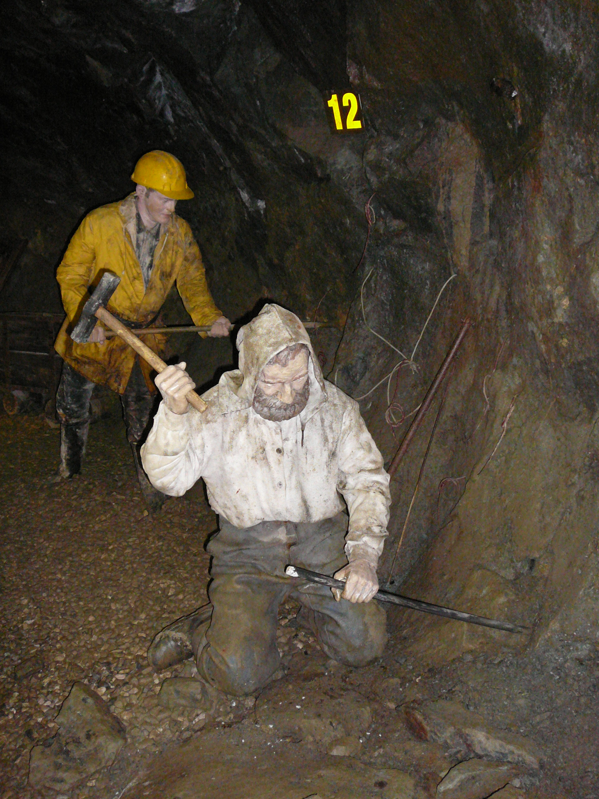 Miniere Predoi - minatori